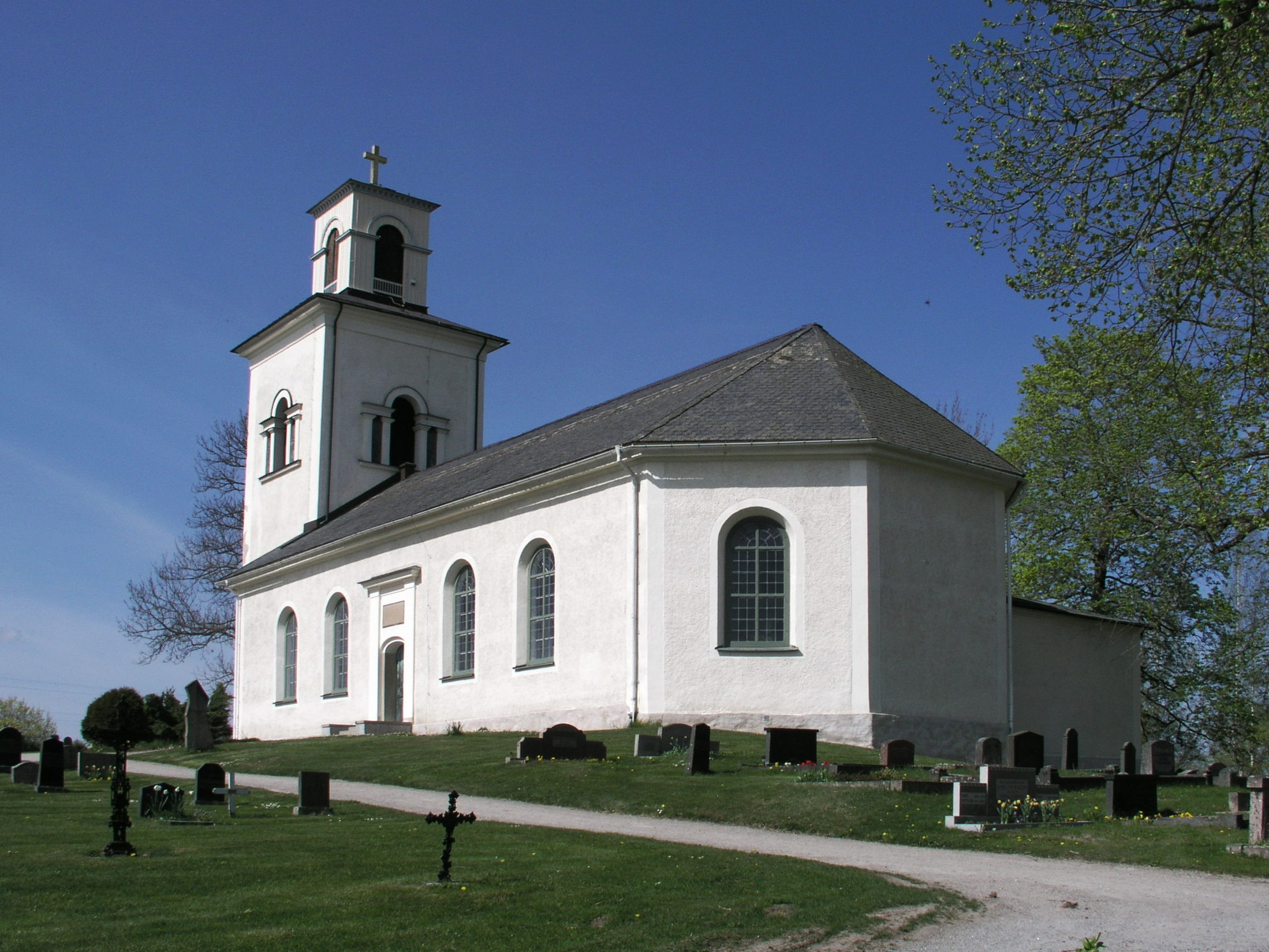 Vintrosa kyrka / church, Tysslinge församling, Strängnäs stift